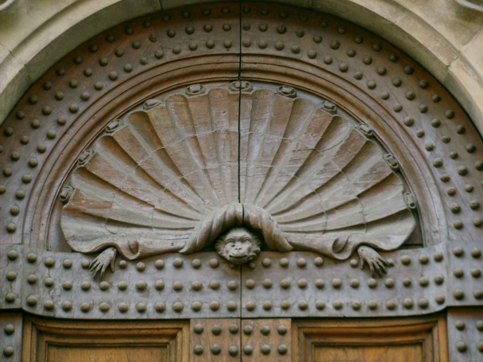 Casino di san marco, scimmietta